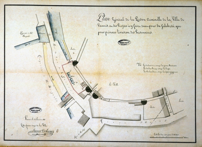 Plan général de la prison criminelle de Vannes (Tour Prison) en 1811 par Brunet-Debaines, Philippe (architecte